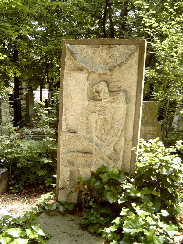 Ascher Oszkár sírja (Majoros János, 1968). Napkorong alatt ülő alak. Fehér mázas kerámia kompozíció. Budapesten. Farkasréti temető: 39-2-12.